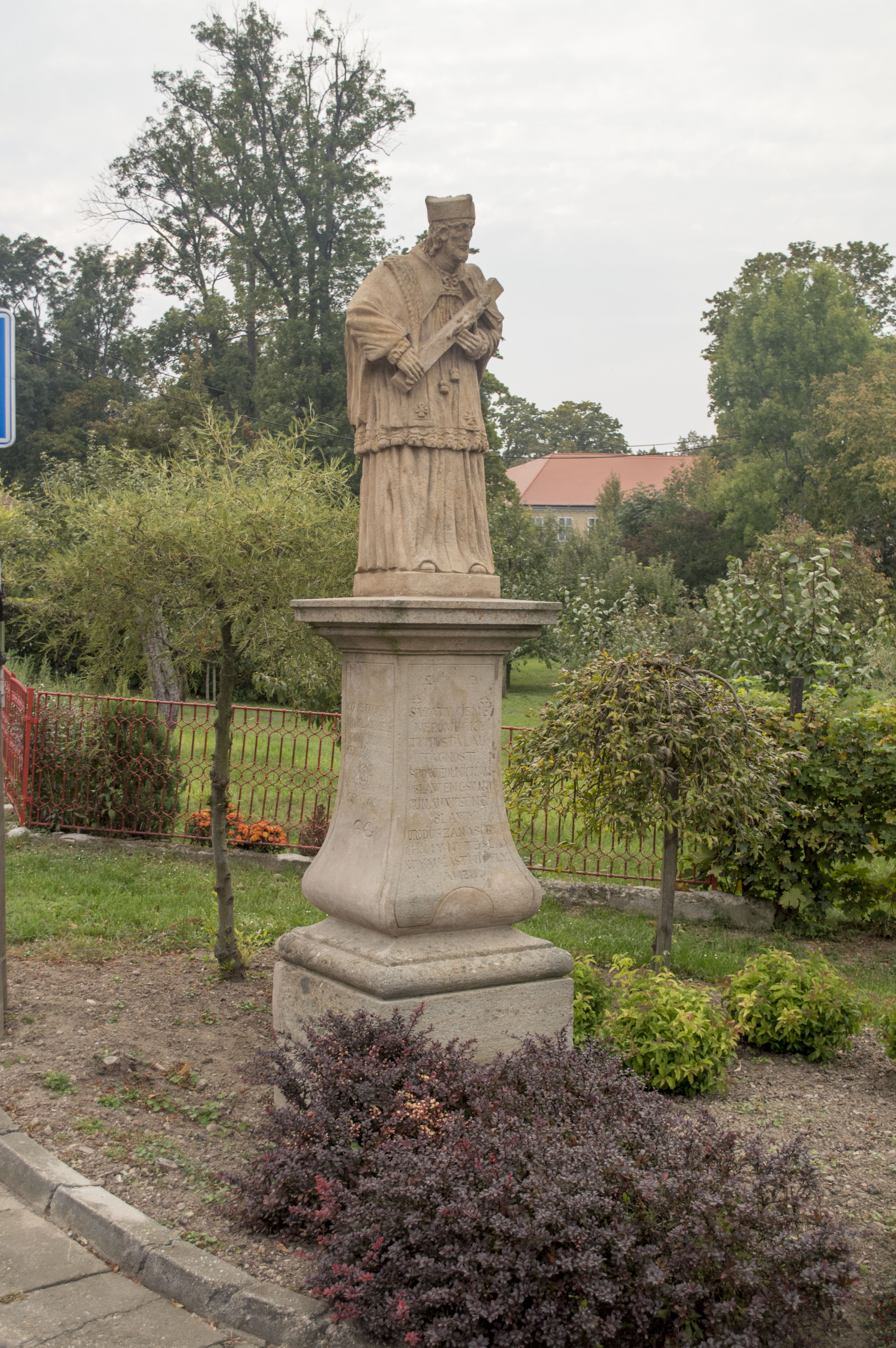 Kulturní památka, pískovcová socha s podstavcem stojící v centru obce Miroslavské Knínice na jižní straně mostu přes Našiměřický potok. V roce 1838 ji nechala postavit místní farnice Eleonora Čurdová.